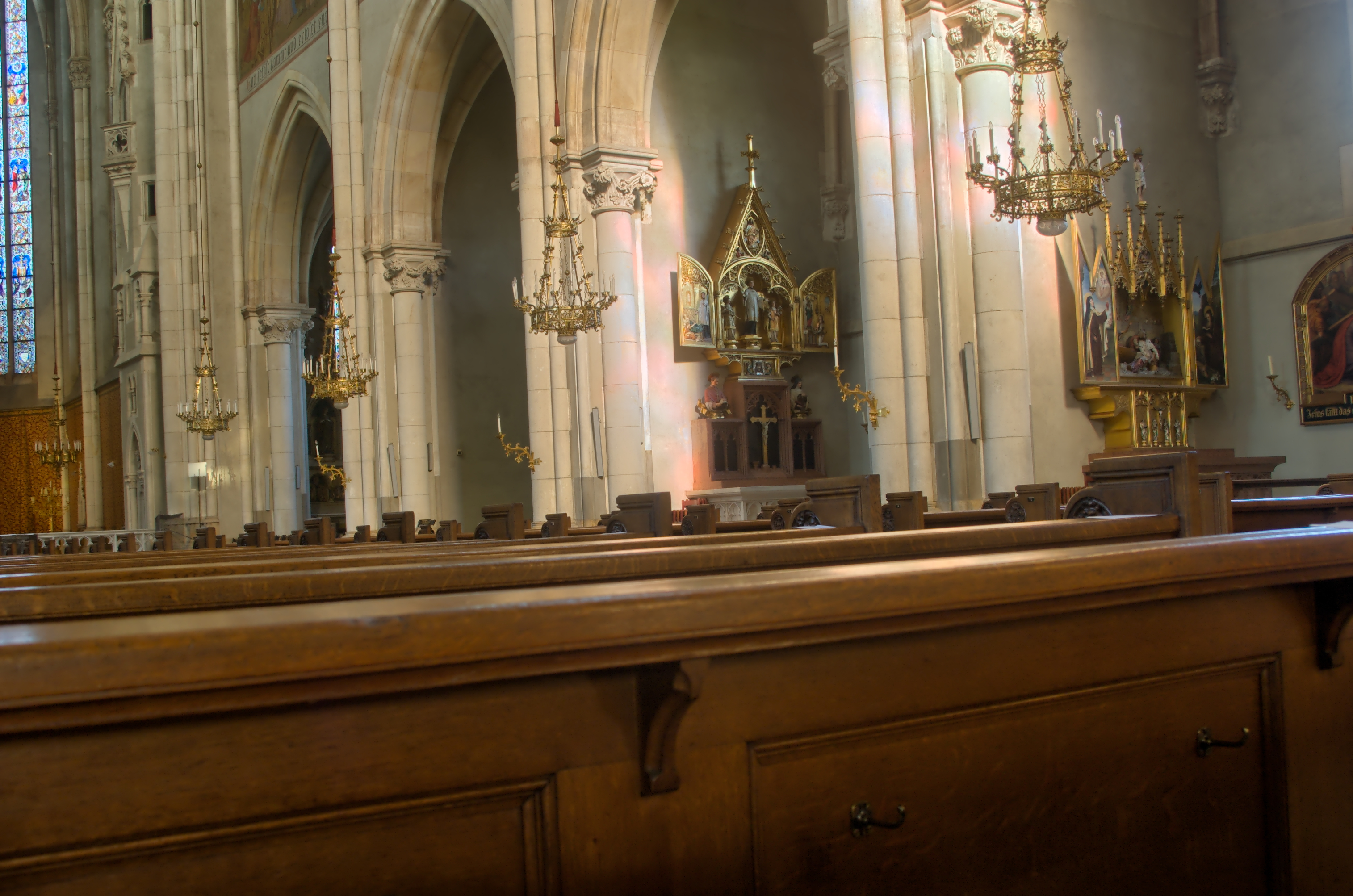 Herz-Jesu-Kirche und Teil der Ummauerung